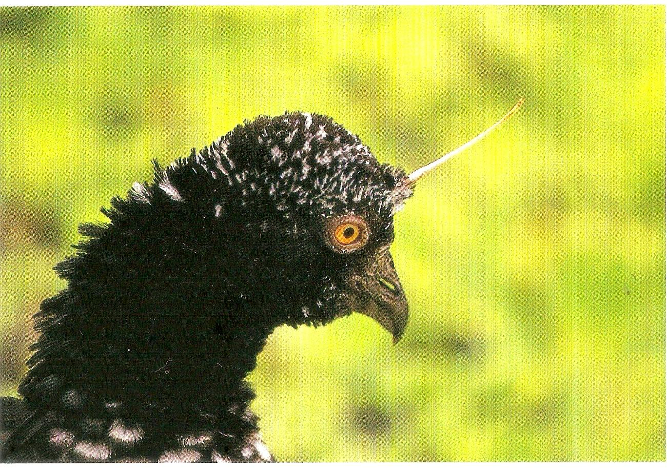 Ésta es la foto de el Arauco, ave insignia del departamento de Arauca (Colombia), presente en los llanos colombovenezolanos.